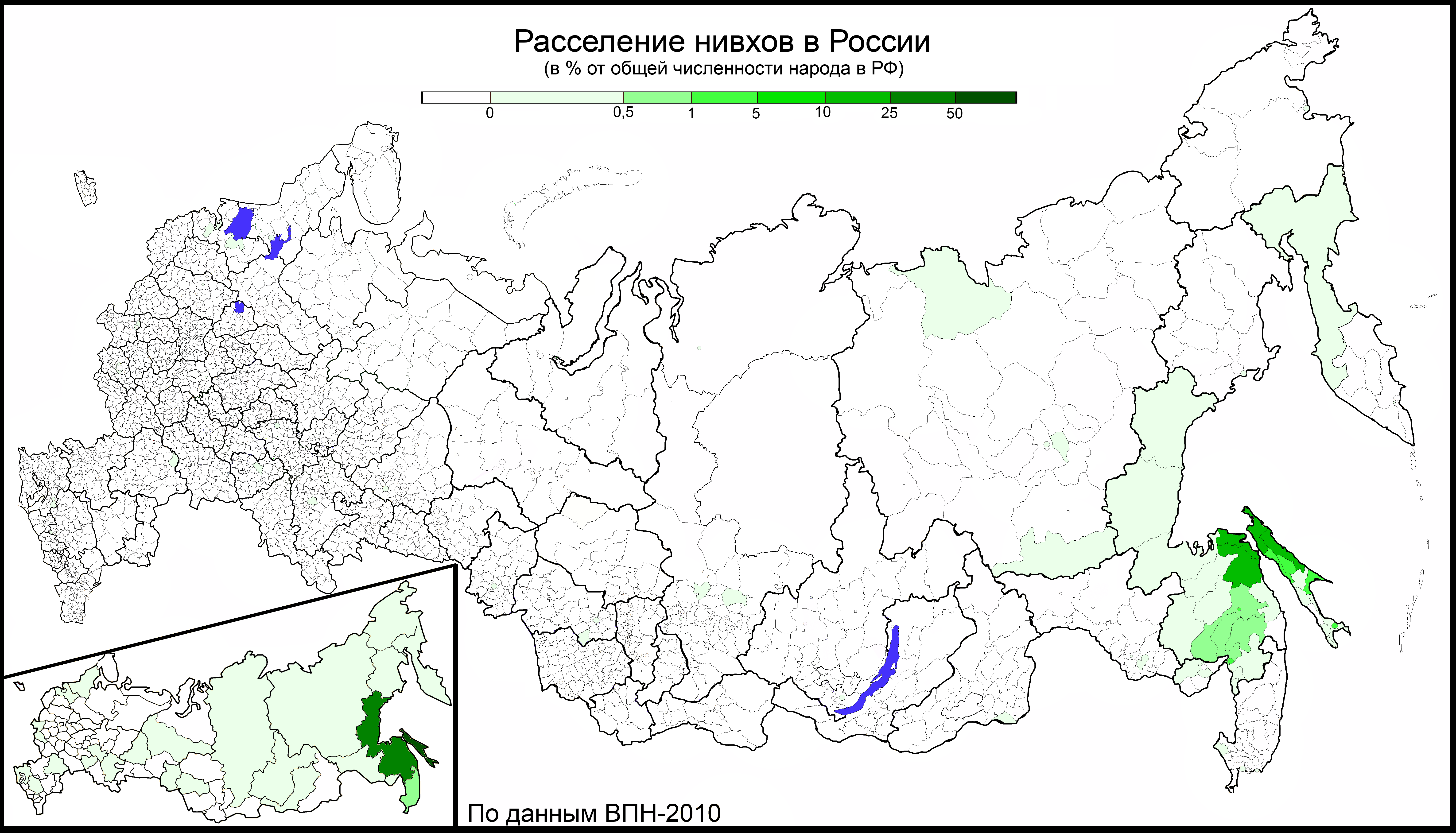 Расселение нивхов в России по муниципальным районам и городским округам в % от общей численности этого народа в РФ. По переписи 2010 года